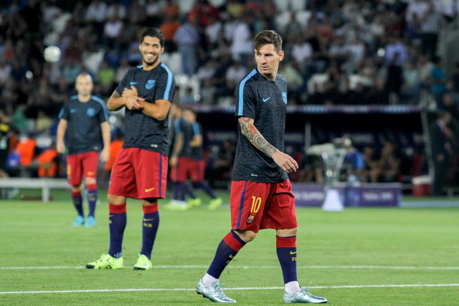 Перед матчем за Суперкубок УЄФА 2015 року у Тбілісі. Грузія